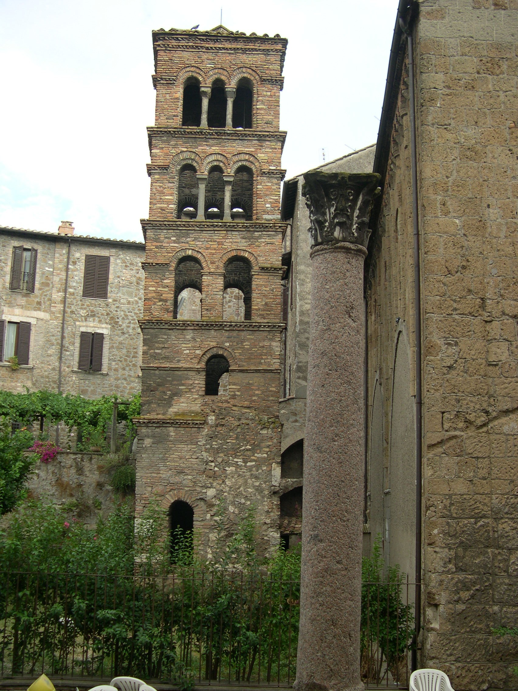 Campanile di San Silvestro a Orte. Foto di Archenzo Agosto 2005